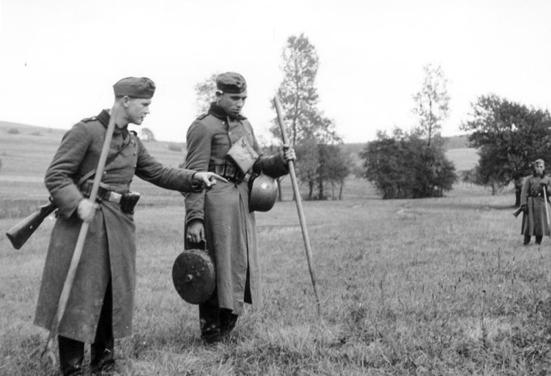 Bebelheim 21.10.39 Minensucher bei der Arbeit "Achtung, da ist eine". Porp. Kp 612 , Bildberichter: Ritter